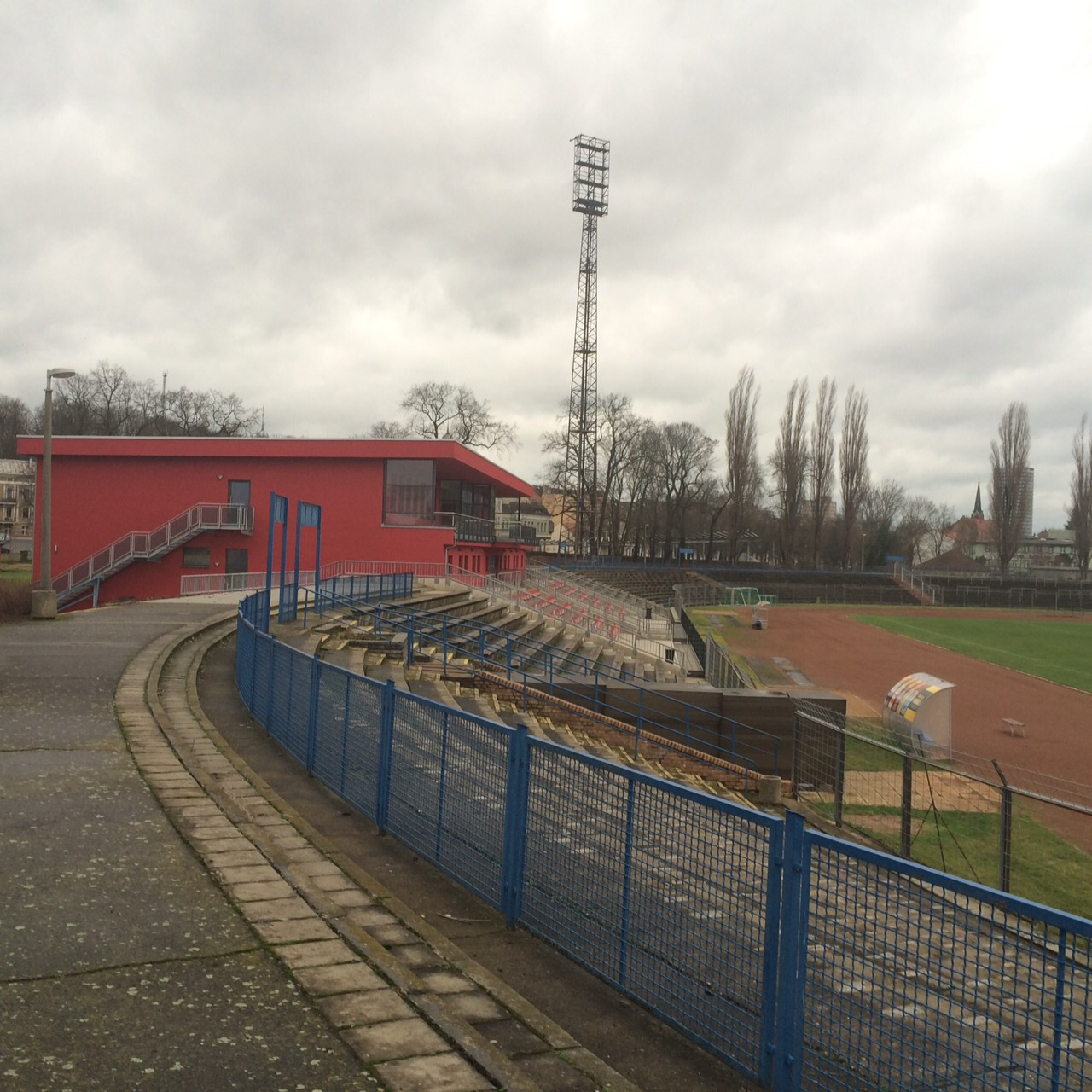 Innenraum